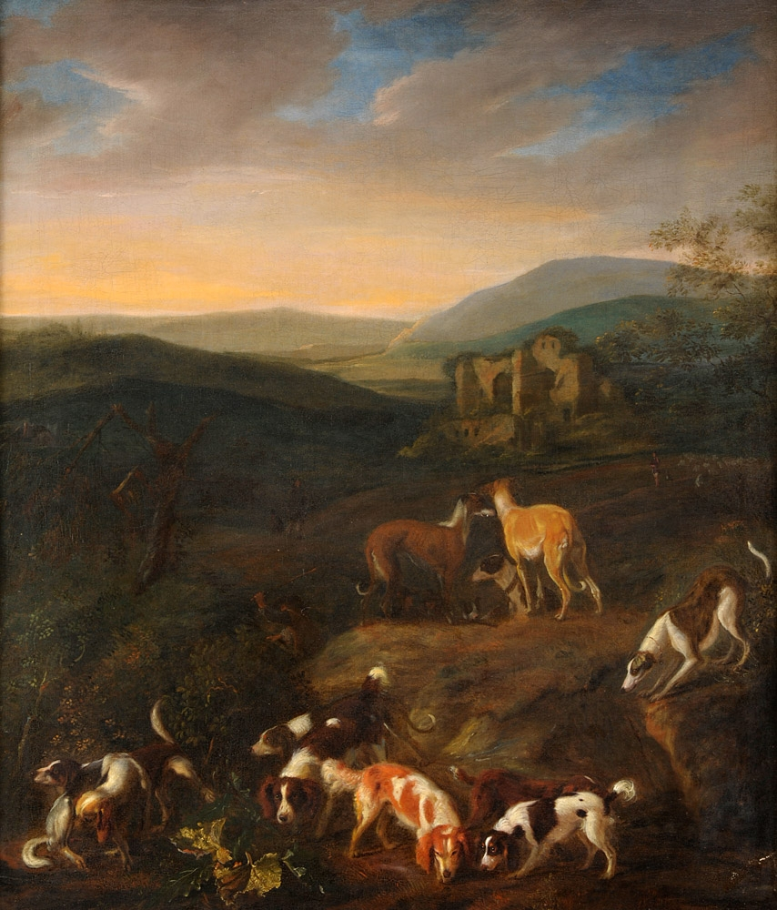 Hundemeute und Jäger. Signiert. Datiert 1660. Öl auf Leinwand, 86 x 74 cm